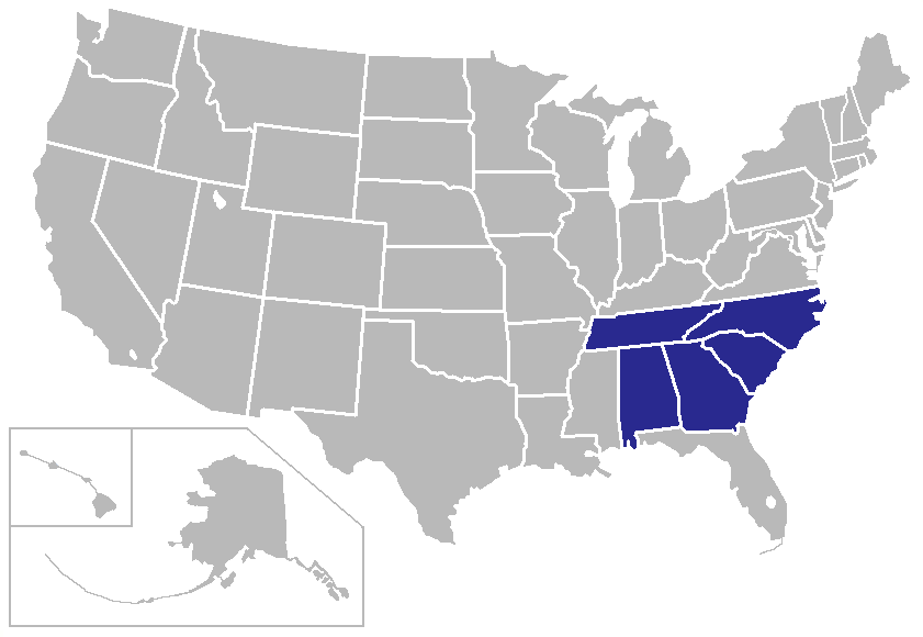 self-made